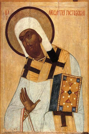 San Leoncio de Rostov